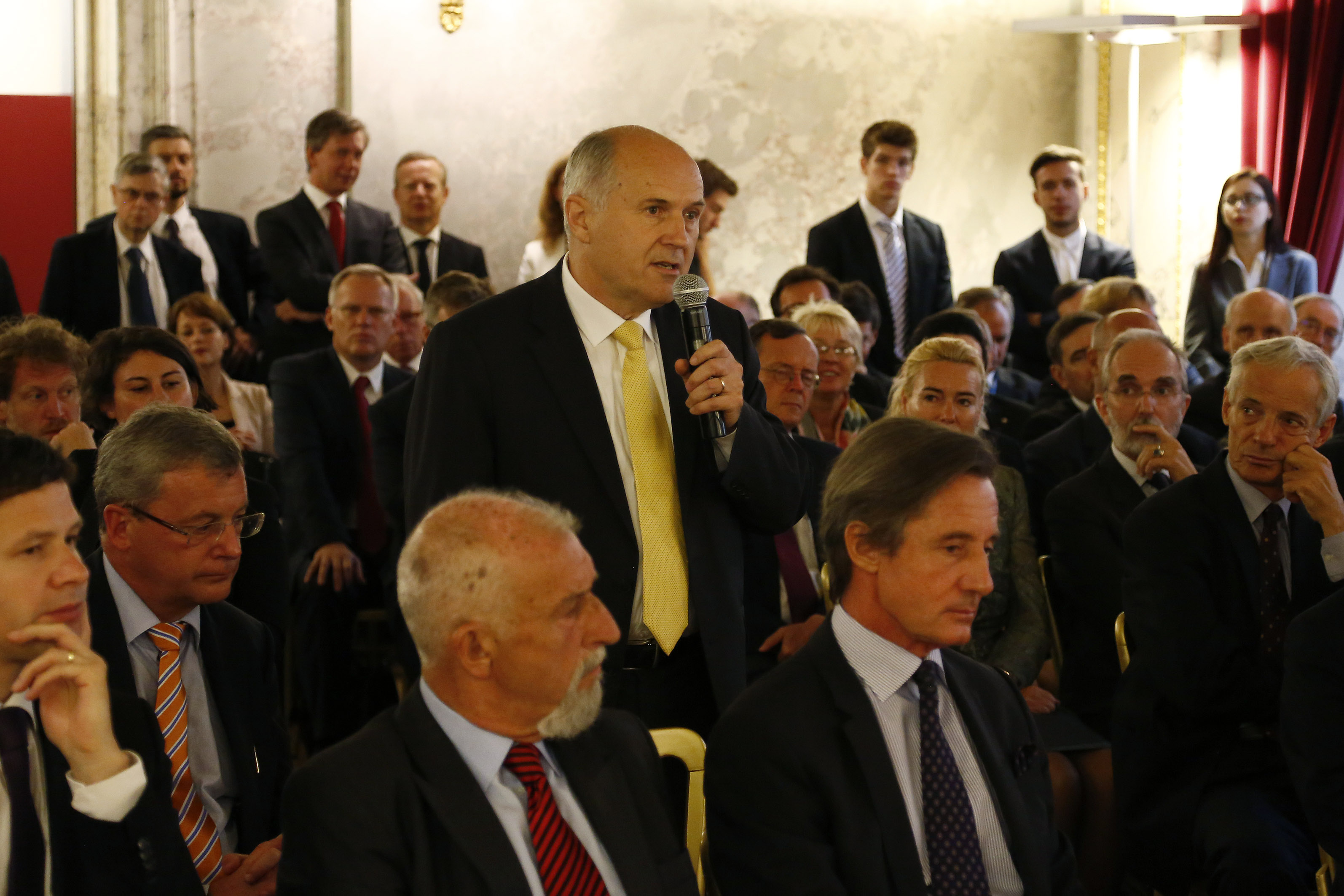 Valentin Inzko bei der Eröffnung der Botschafterkonferenz 2014, Wien, Minoritenplatz, 01.09.2014, Foto: Dragan Tatic